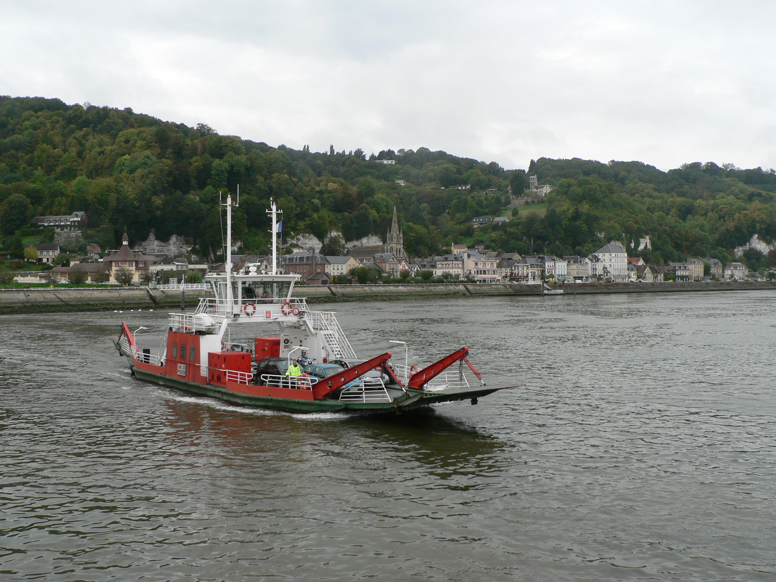 La Bouille et le bac n°20 (La Bouille and the ferry)